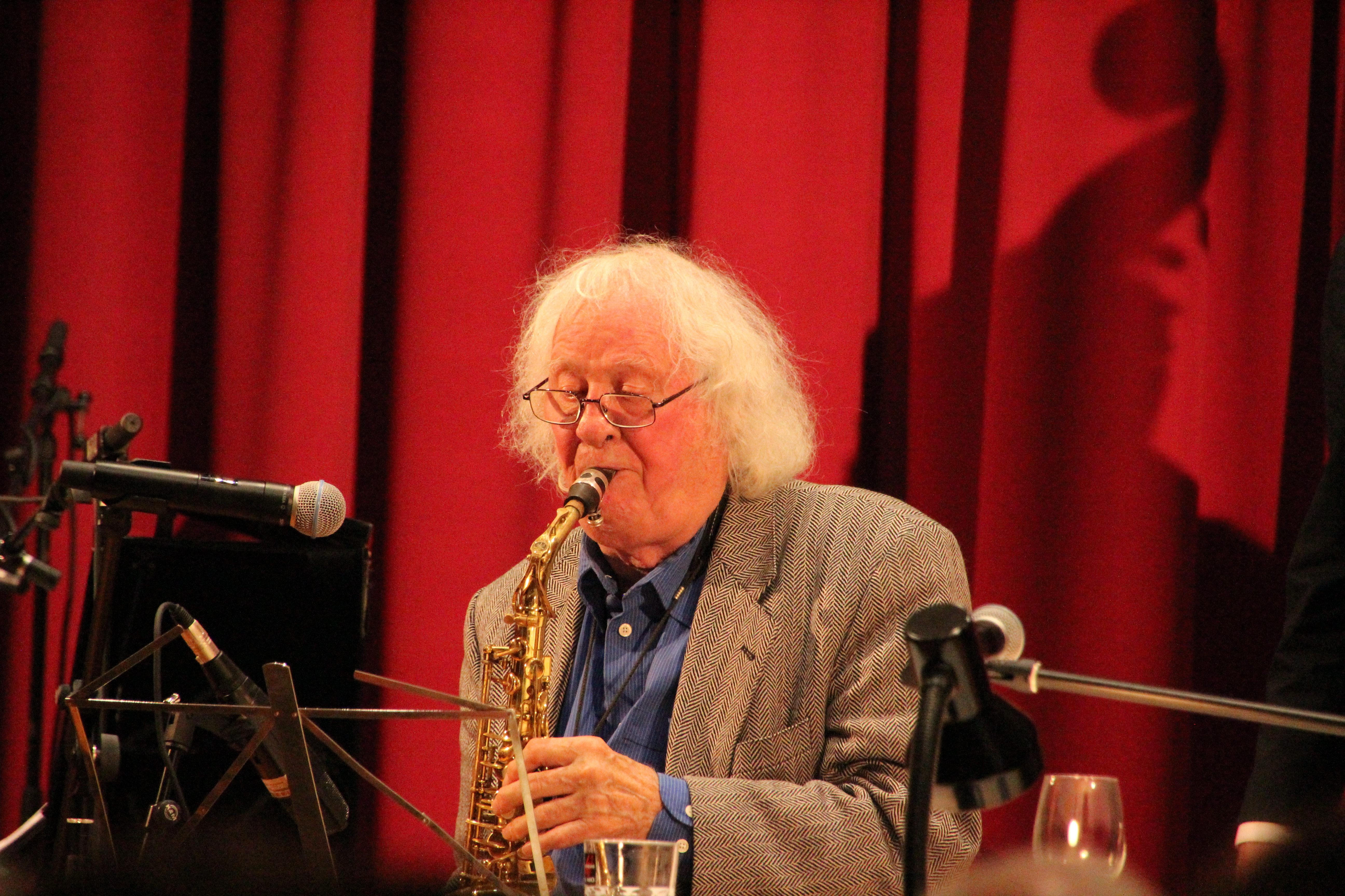 Bildinhalt: "Swing tanzen verboten". Gesprächskonzert mit Emil Mangelsdorff und seinem Quartett in der Stadtbibliothek Hanau. Emil Mangelsdorff - Altsaxophon, Uli Partheil - Piano, Jean-Philippe Wadle - Bass, Janusz Stefanski - Drums Aufnahmeort: Hanau, Deutschland